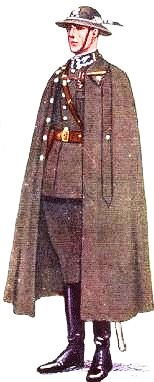 1935 porucznik strzelców podhalańskich 1935. Ubiór służbowy